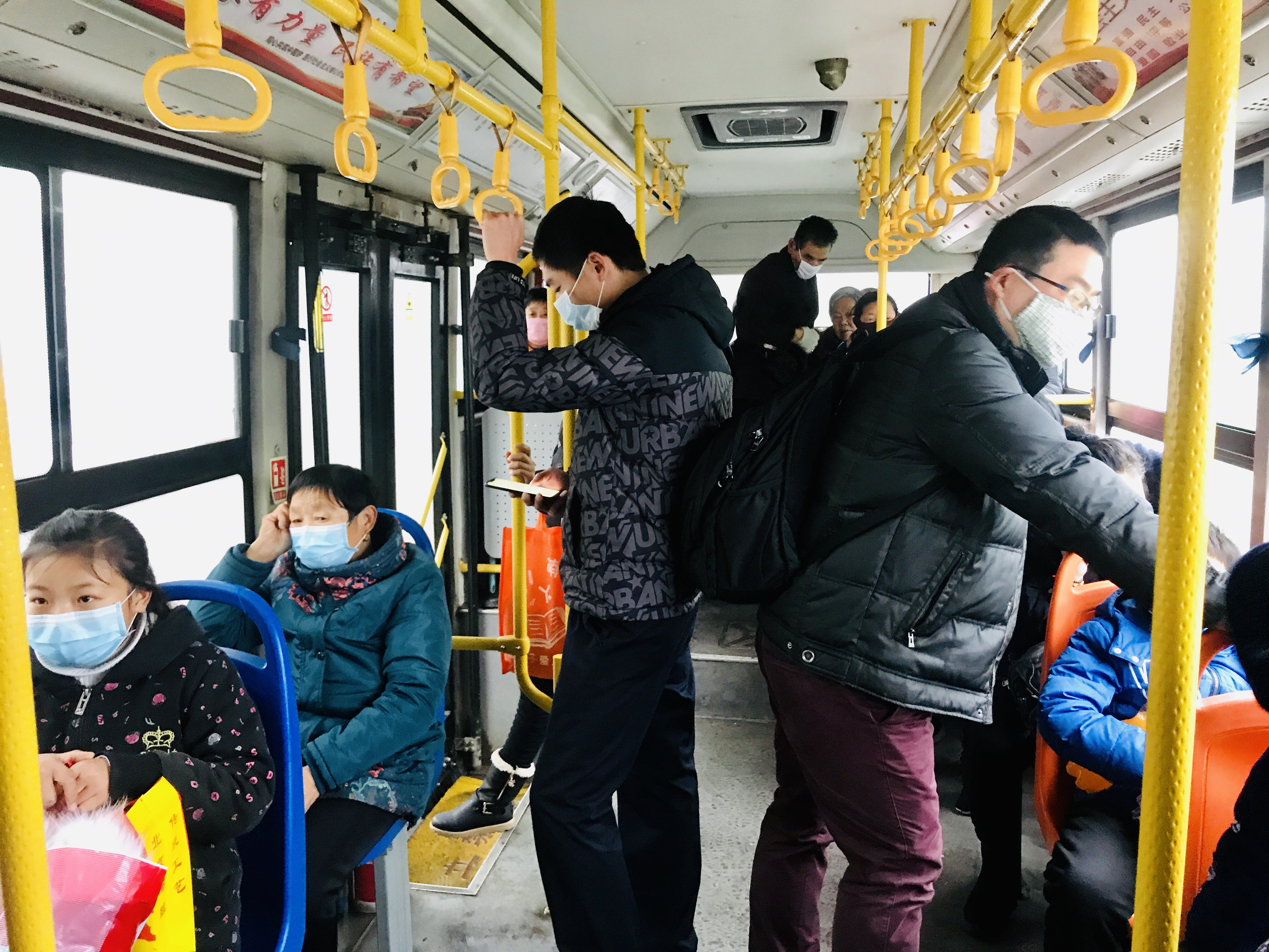 2020-1-23 湖北黄冈黄州区的一个公交车上